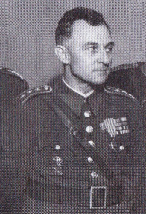 František Bürger-Bartoš (25. listopadu 1898 v Čertyni – 15. října 1964 v Praze) byl za první světové války příslušníkem československých legií na italské frontě. Po první světové válce vstoupil se zkušenostmi zpravodajce do československé prvorepublikové armády a dosáhl důstojnické hodnosti (podplukovník generálního štábu). Za protektorátu se účastnil (v řadách vojenské ilegální organizace Obrana národa) protiněmeckého odboje. V Pražském květnovém povstání roku 1945 zastával funkci náčelníka štábu povstaleckého Vojenského velitelství Velké Prahy "Bartoš" a organizoval bojovou činnost pražských povstalců. Po druhé světové válce byl povýšen do hodnosti brigádního generála, ale na samém začátku 50. let dvacátého století se stal politickým vězněm a byl dokonce degradován na vojína. Koncem roku 1957 byl zproštěn obžaloby a byla mu navrácena generálská hodnost. O pět let později ochrnul po mozkové mrtvici a poslední dva roky svého života prožil upoután na lůžko. Výřez z fotografie datované k roku 1945.